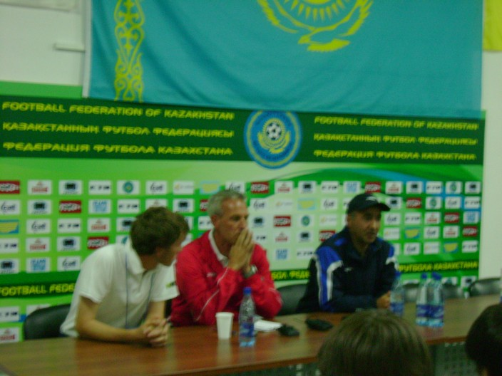 Шахин Диниев Пресс Конференция